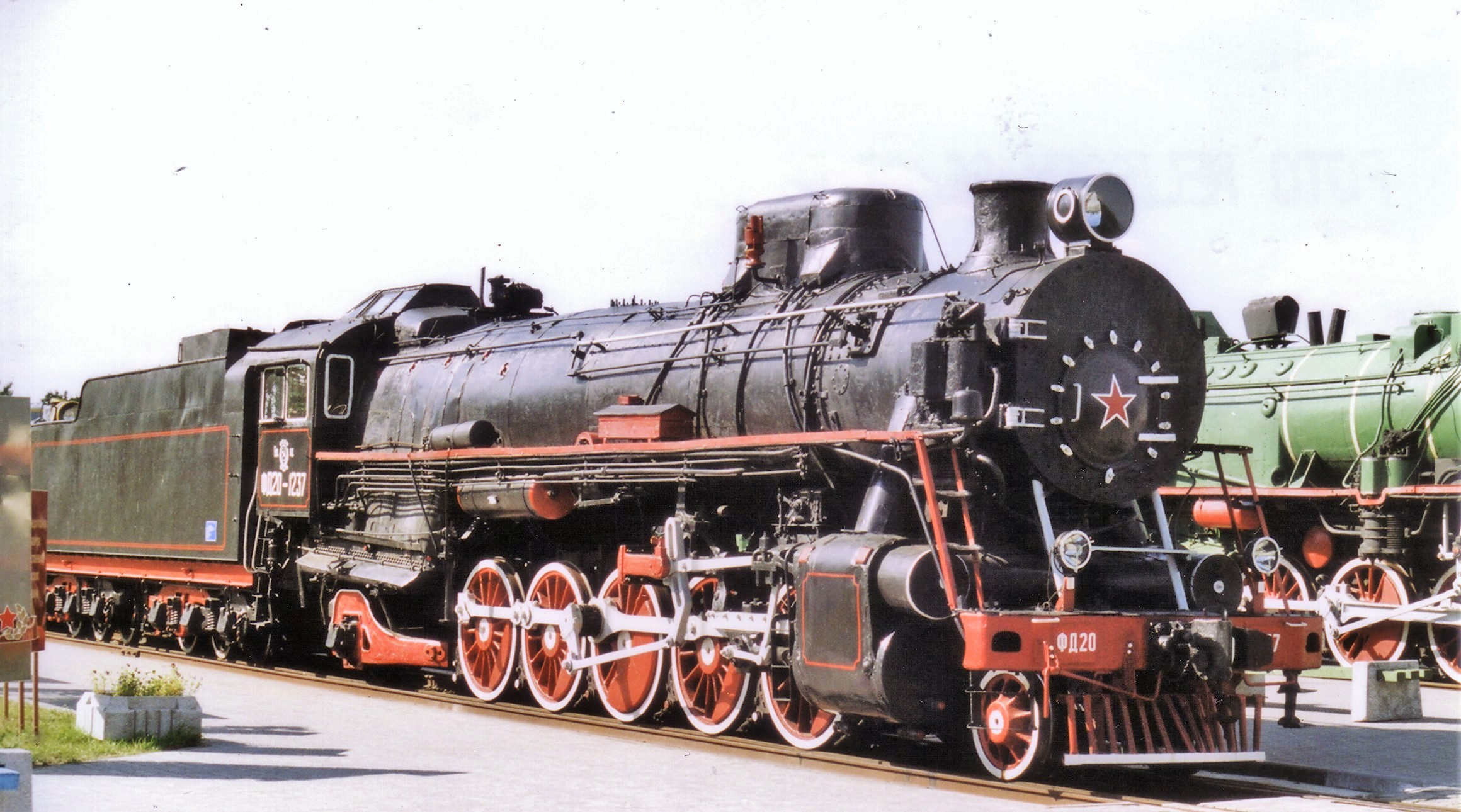 Parovoz "Felix Dzherzinski" in Brest museum Type "Felix Dzherzinski" in Brest Railway Museum